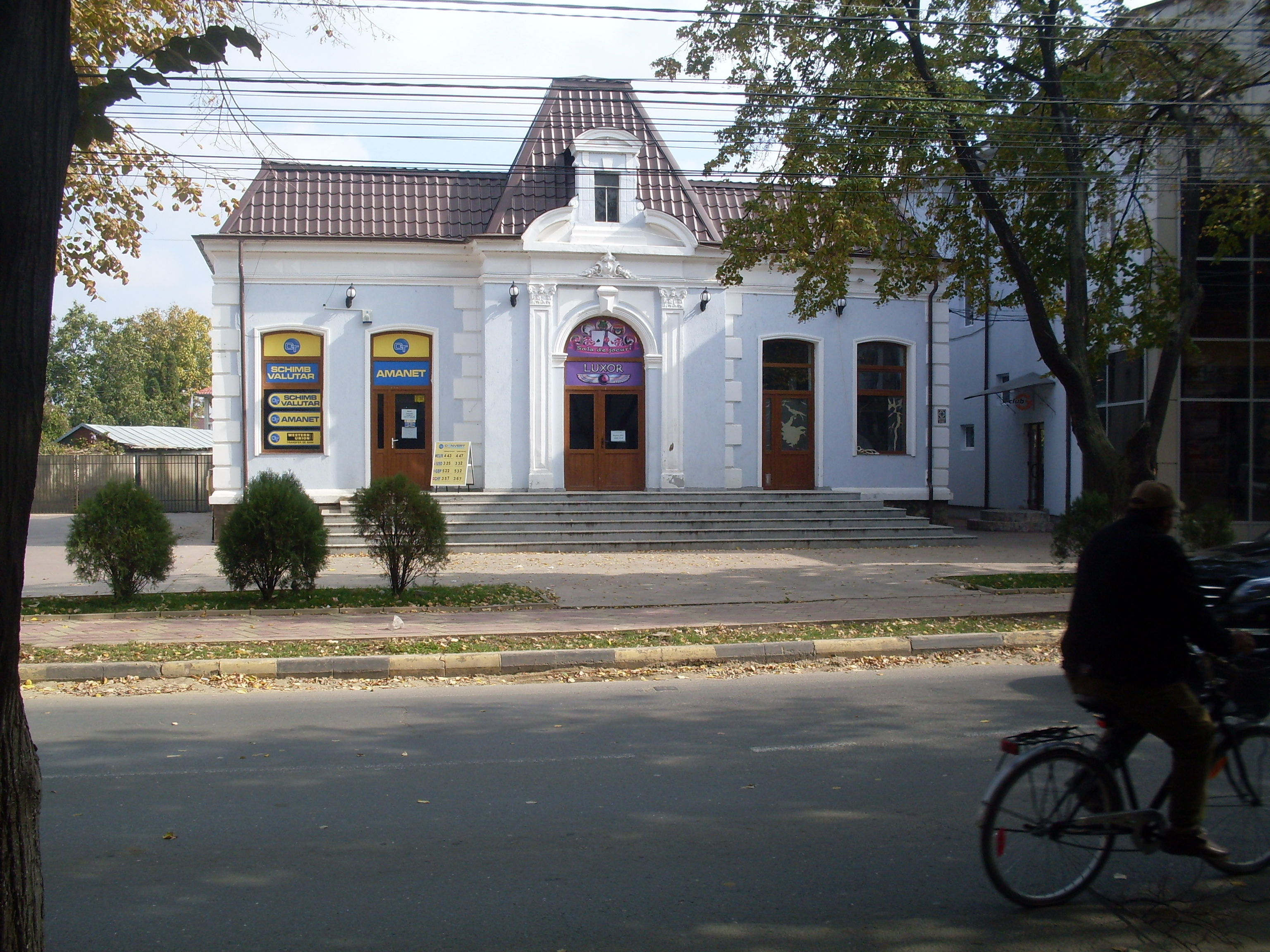 Vila Maria Șendrea